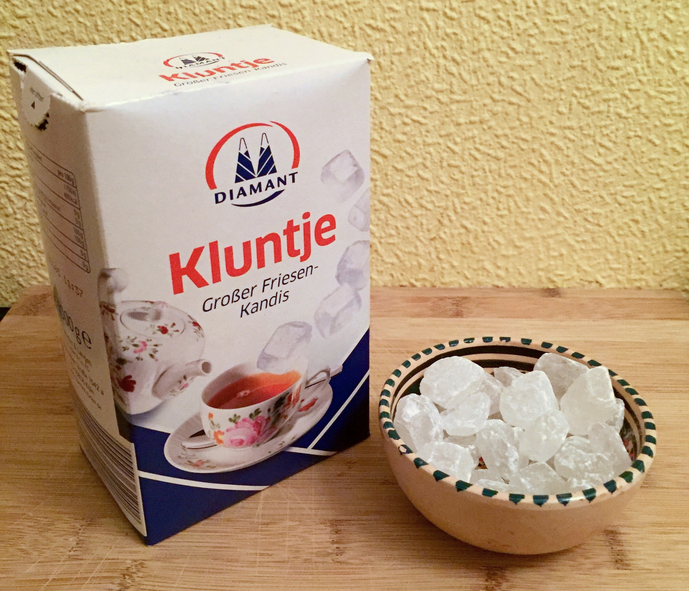 Kluntjes